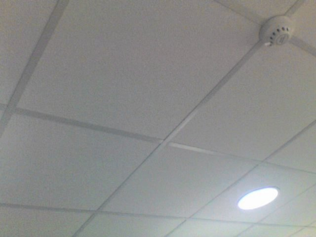 Suspended (aka dropped) ceiling.